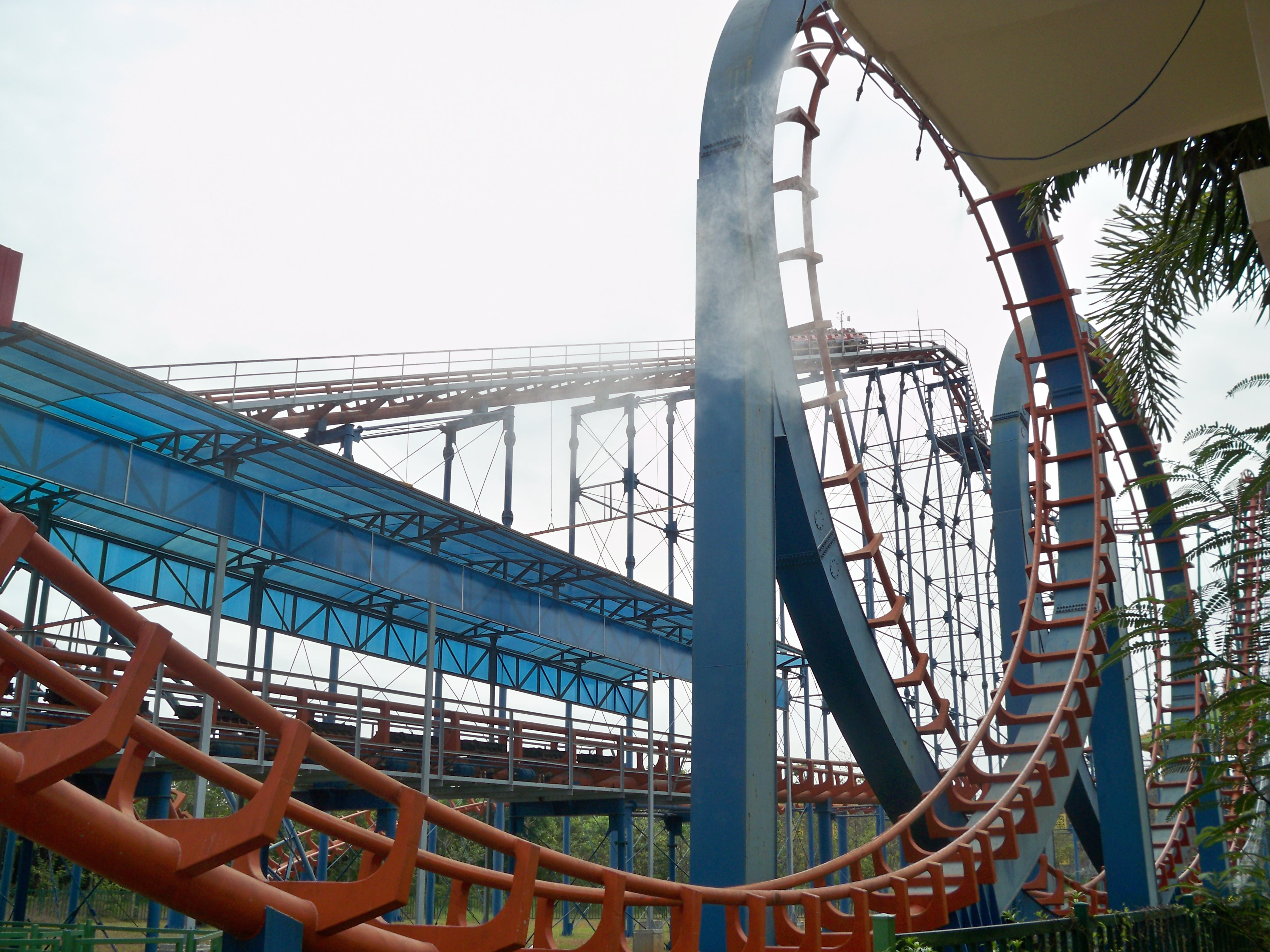 Đại Nam 6.